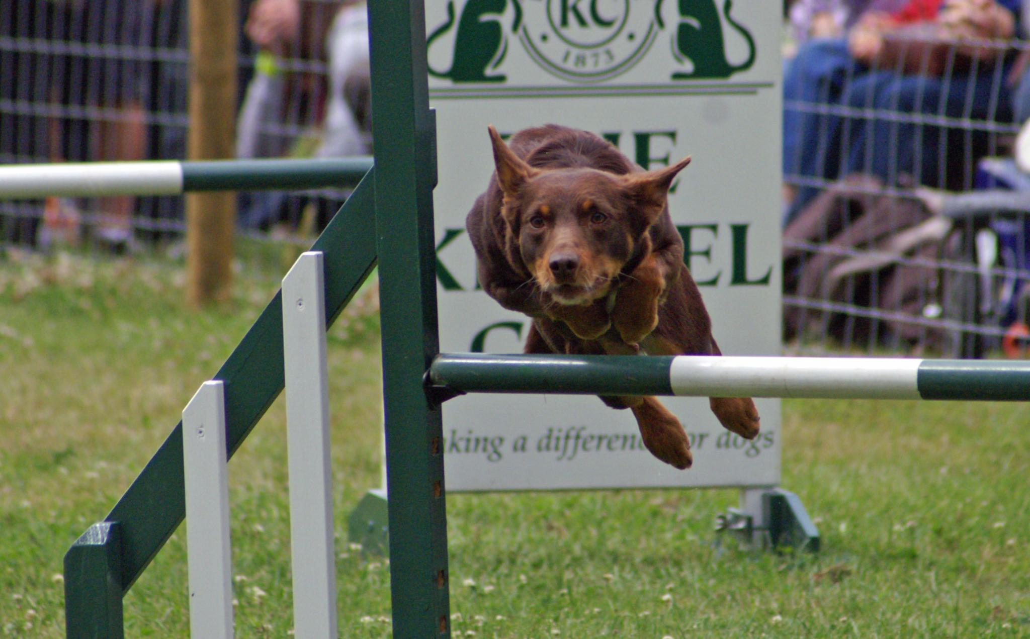 Dog Agility Class